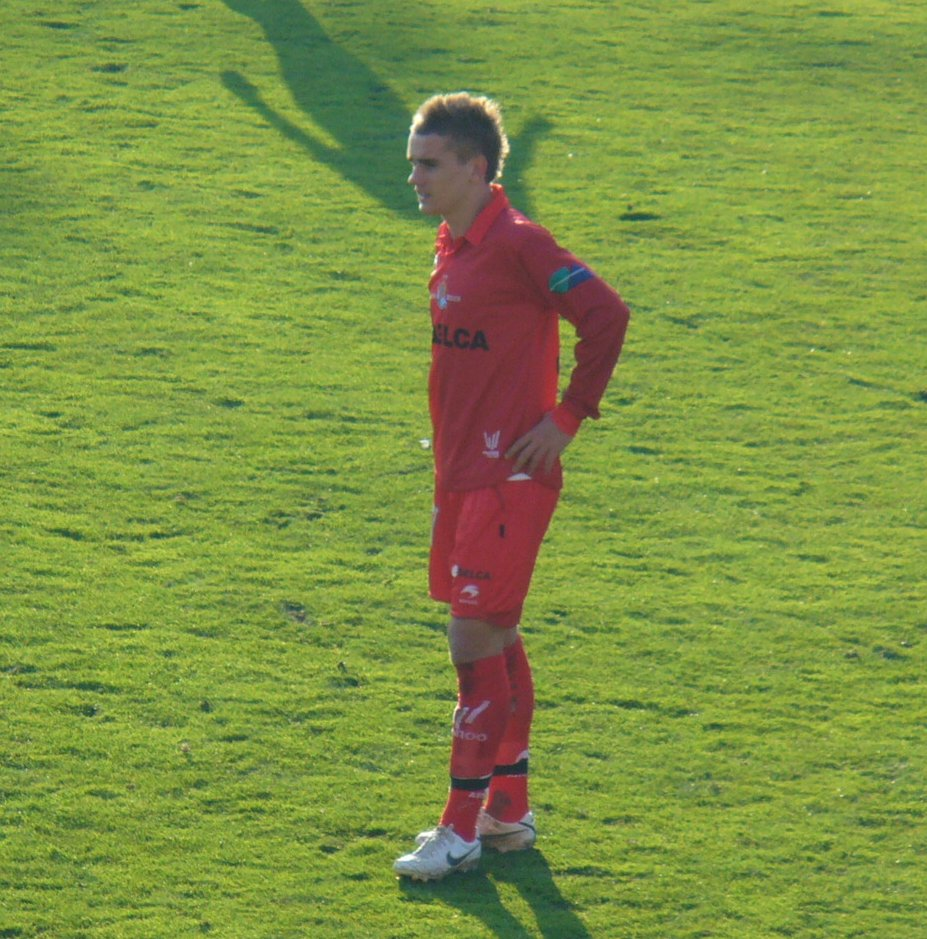 Griezmann en el partido U.D. Salamanca - Real Sociedad con la segunda equipación de la Real Sociedad en el campo de Helmántico de Salamanca